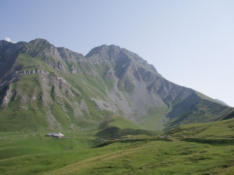 Le Kaiseregg sommet des préalpes fribourgeoises, depuis le nord.